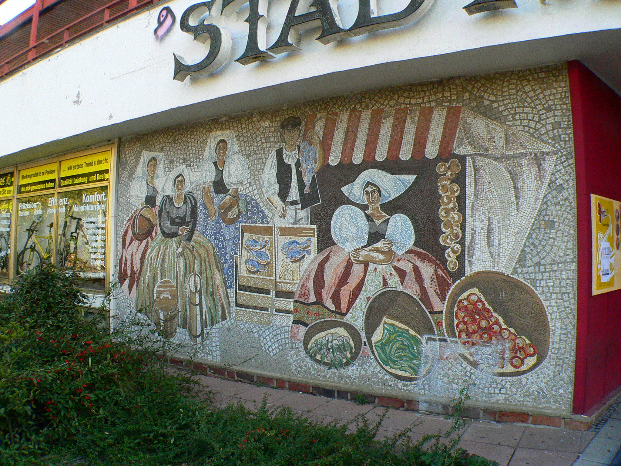 Cottbus - DDR-Kunst, "Cottbuser Bauernmarkt" (1970), farbiges Mosaik von Dieter Dressler und Heinrich Jungebloedt. Dieses Mosaik hat eine Größe von 6 m × 3 m.